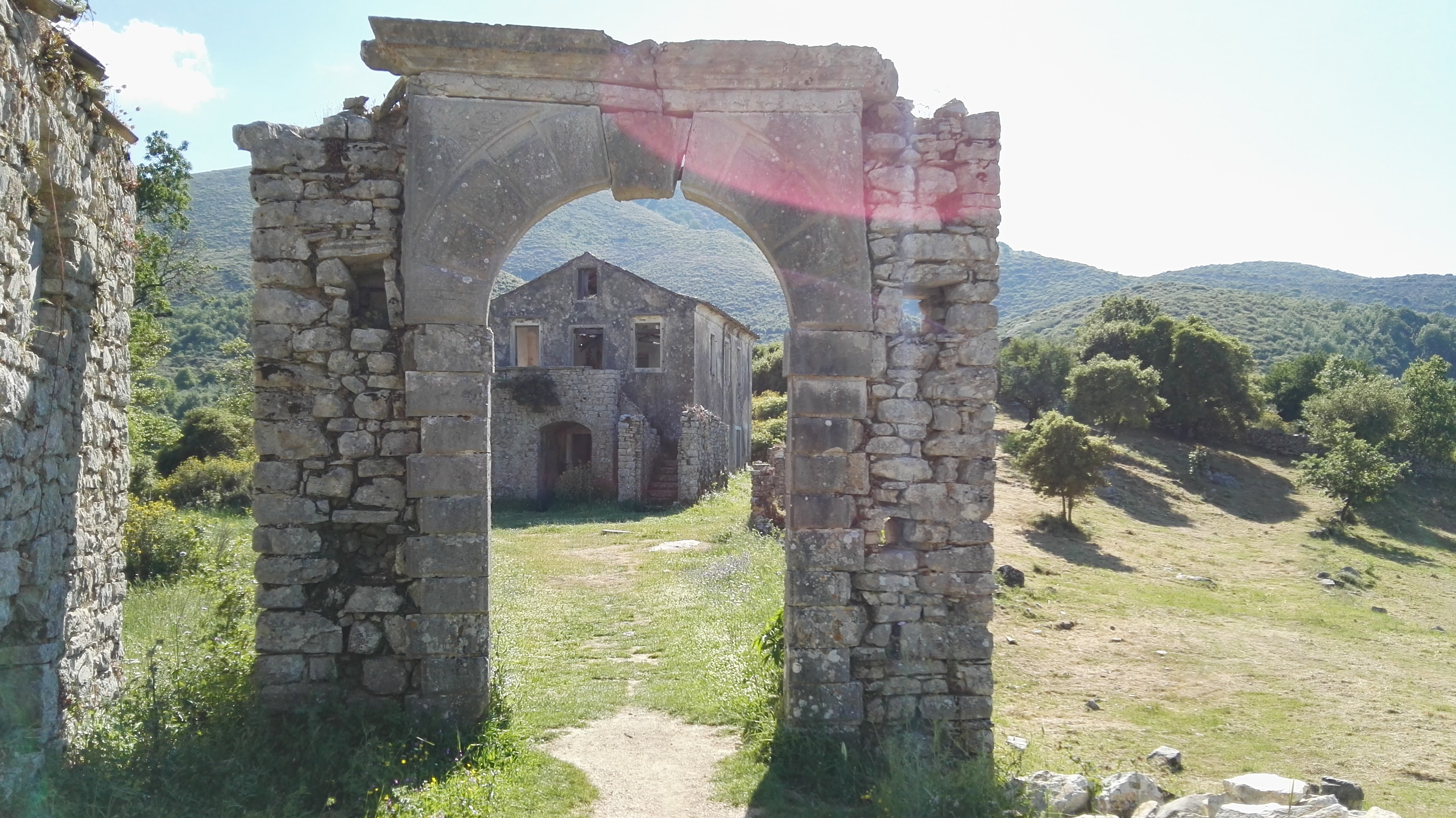 verlassenes ehemaliges venezianisches Dorf Paleo Perithia auf Korfu